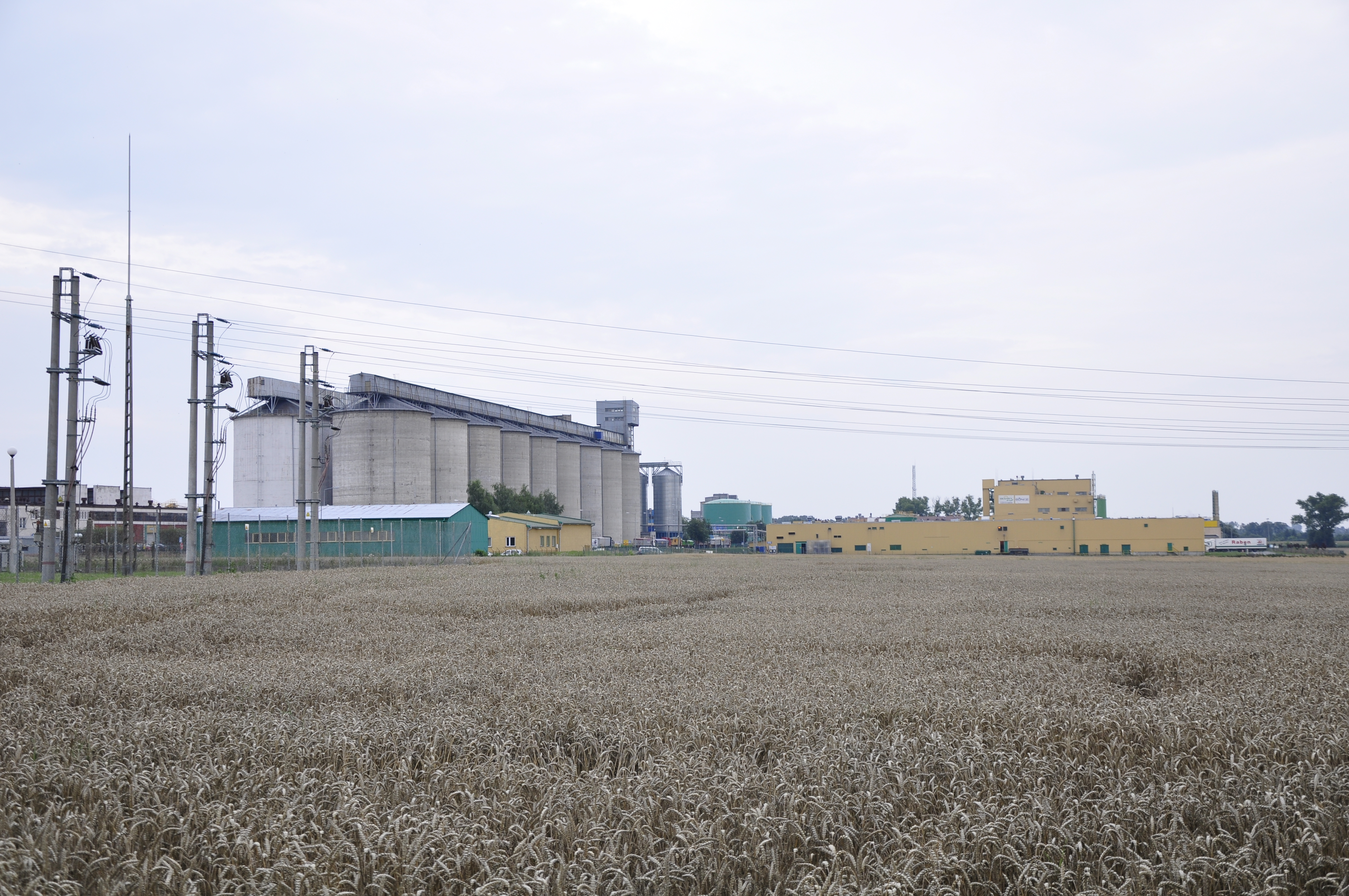 Kruszwica Speiseölfabrik Polen